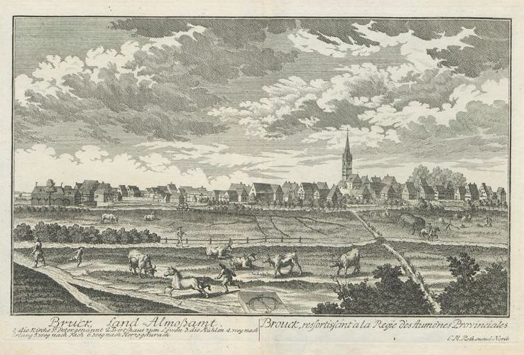 aus: Christoph Melchior und Matthäus Roth: Prospecte aller Nürnbergischen Stædtlein, Markt-Flecken, und Pfarr-Dörffern, accurat abgezeichnet von M. G. Lampferdtinger. Christoph Melchior Roth, iny. del et sculps. Nürnberg, 1760